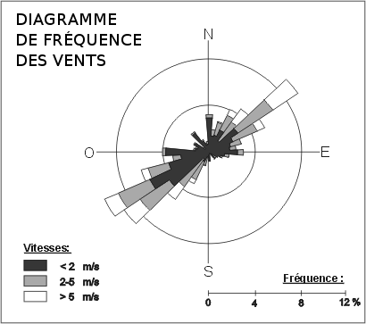 Diagramme radial montrant la fréquence annuelle de la direction et de la force des vents en un endroit.